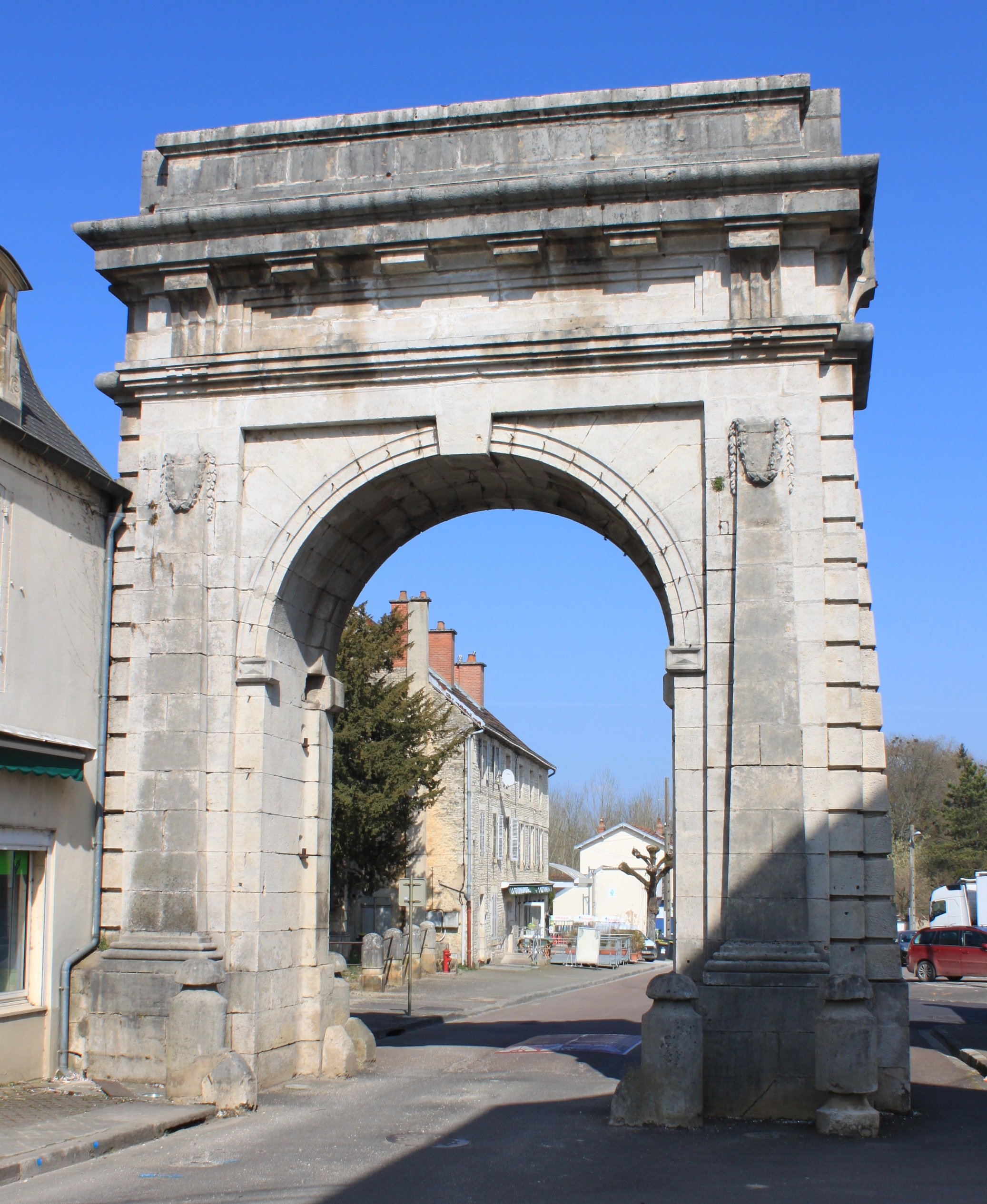 Châtillon-sur-Seine, Côte-d'Or, Bourgogne, France